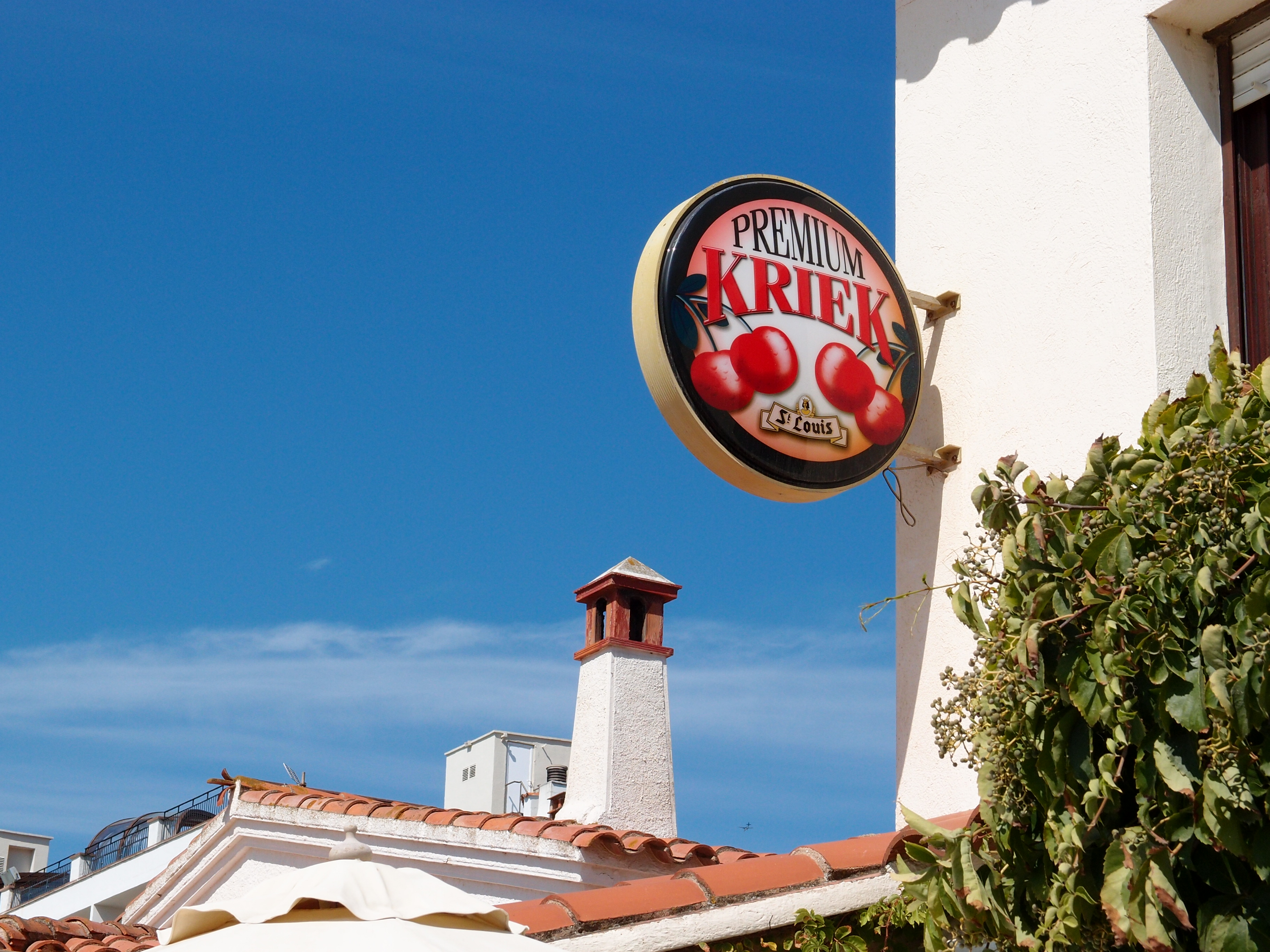 Kriek Außenwerbung in Roses / Katalonien / Spanien Datum: 15.09.2011 Urheber: M. Pfeiffer alias Gordito1869 Quelle: Privates Fotoarchiv des Urhebers